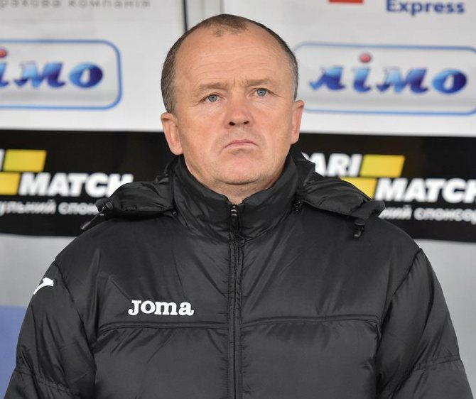 Олег Дулуб під час першого матчу на чолі Карпат (Львів)